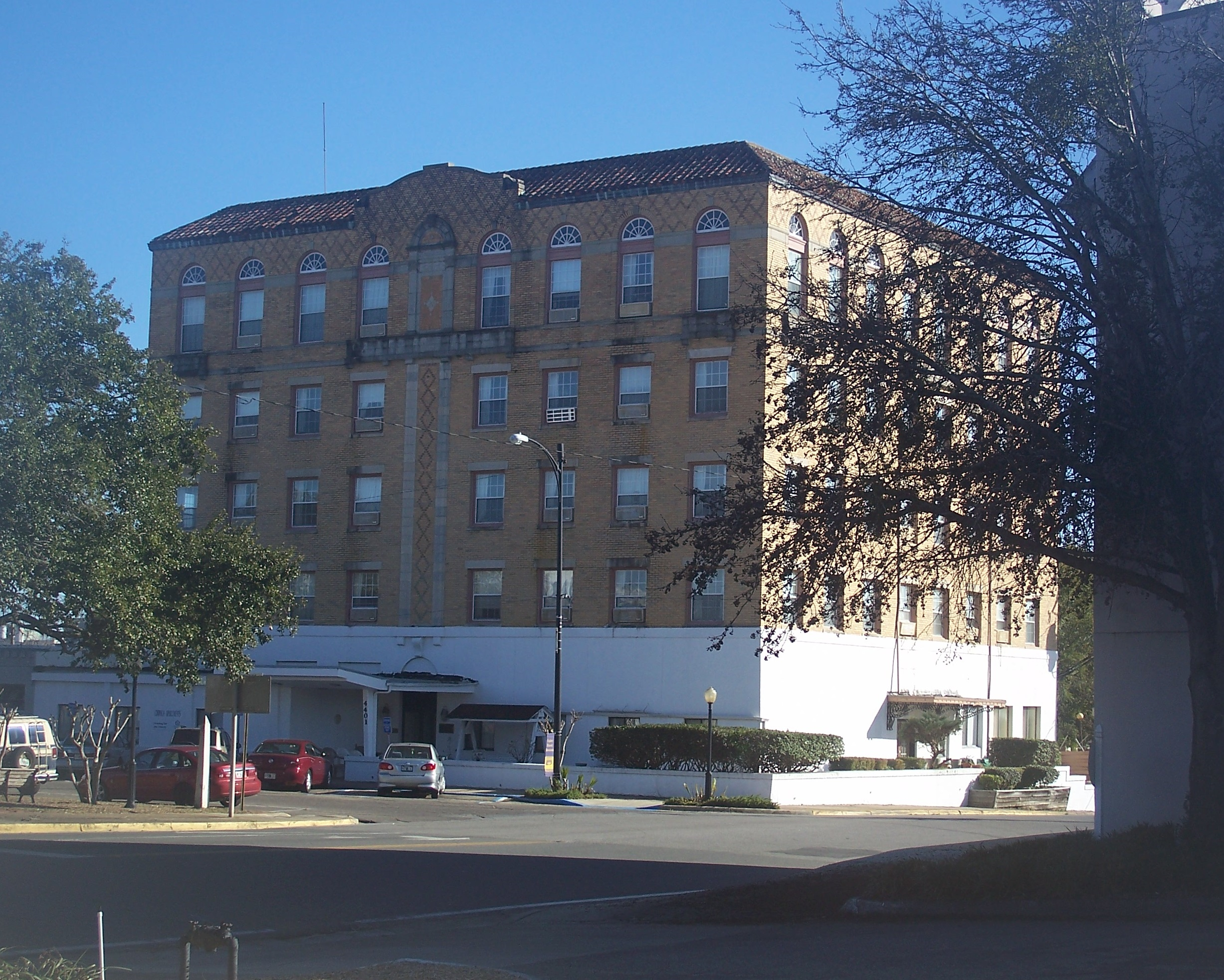 Marianna, Florida: Marianna Historic District: Chipola Hotel